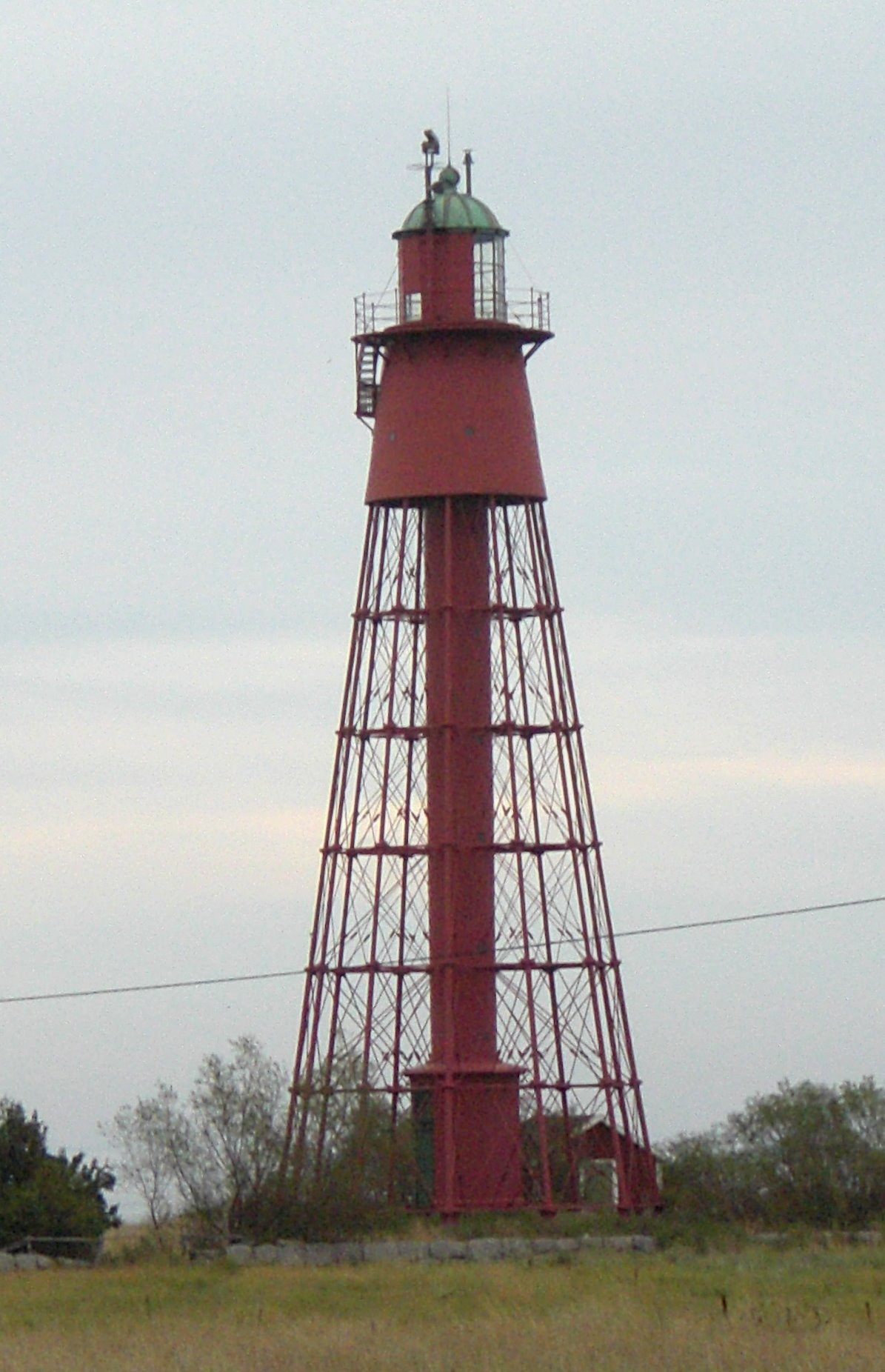 Leuchtturm auf Kapelludden, Blick von Süden